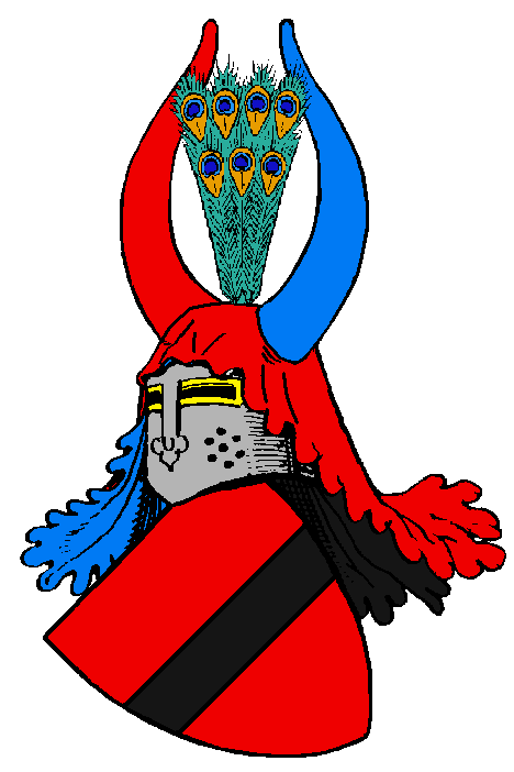 Stammwappen der mecklenburgischen (Krab(b)e) von Ulshagen